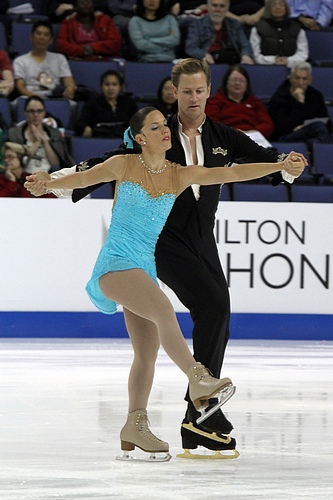 Tiffany VISE and Don BALDWIN at the 2011 Skate America